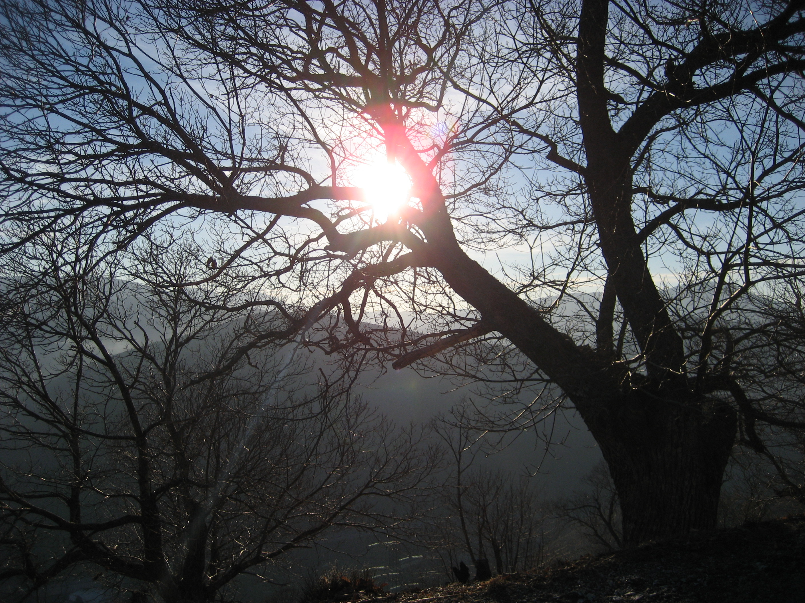 Imagen invernal cerca de Trabadelo (El Bierzo, León, España).